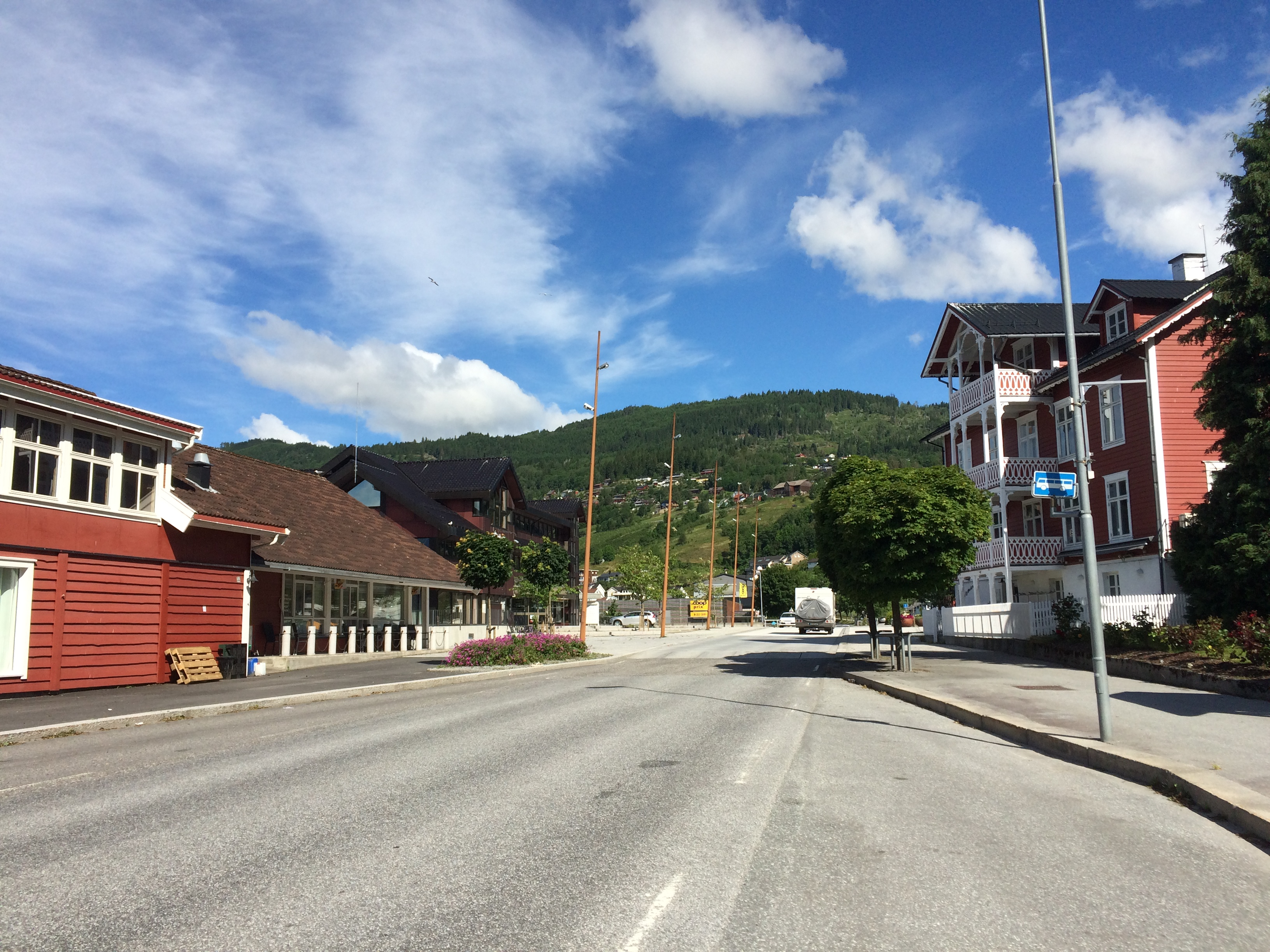 Fra Hermansverk